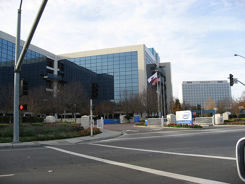 Intel headquarters in Santa Clara